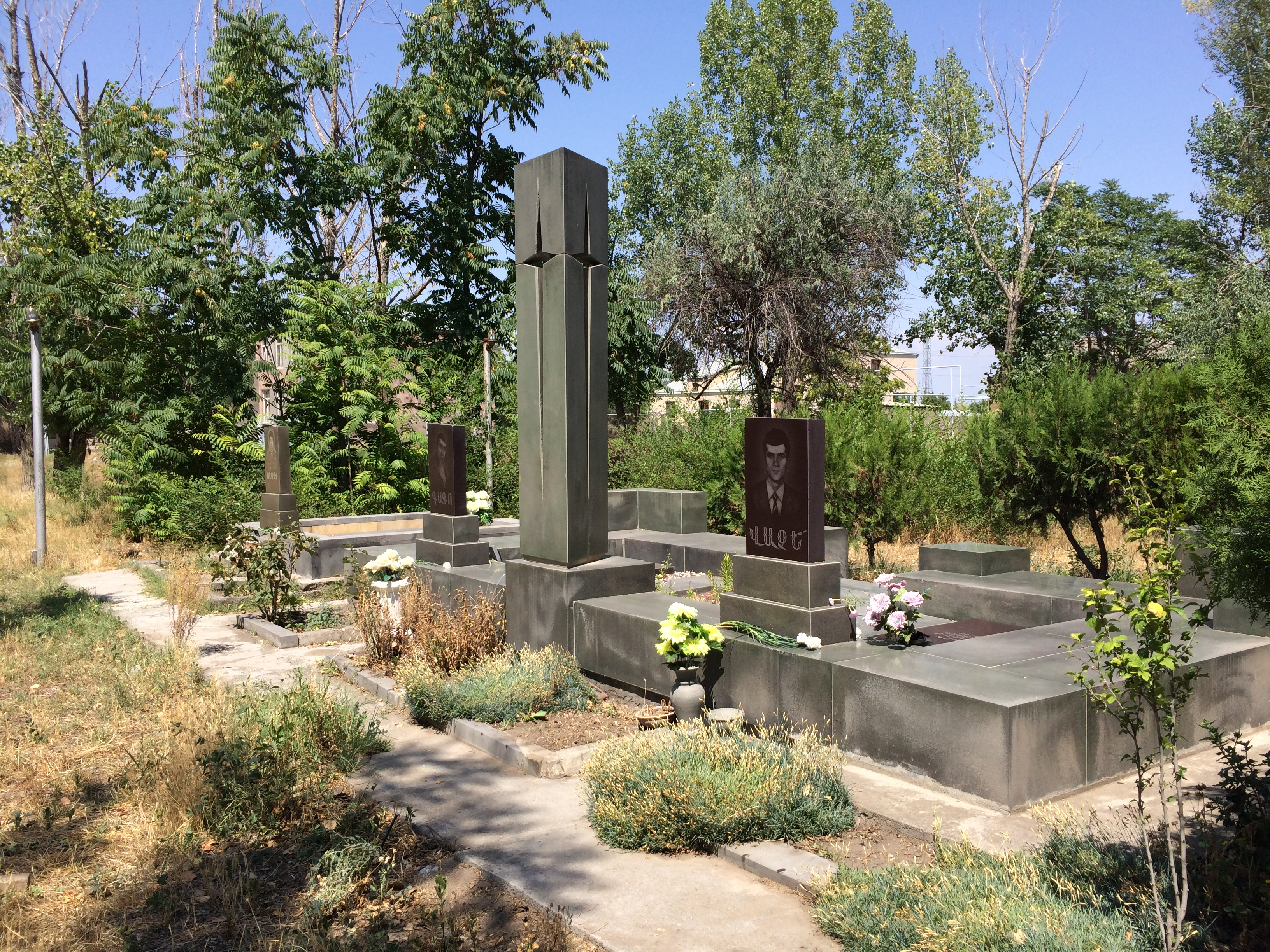 Վաչեի շիրիմը Գրիբոյեդով գյուղում